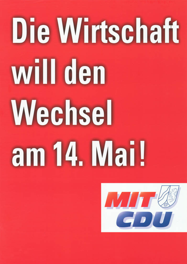 Die Wirtschaft will den Wechsel am 14. Mai! MIT CDU Plakatart: Textplakat Allgemein Auftraggeber: MIT NRW Objekt-Signatur: 10-009 : 1505 Bestand: Landtagswahlplakate Nordrhein-Westfalen (10-009) GliederungBestand10-18: Landtagswahlplakate Nordrhein-Westfalen (10-009) » CDU Lizenz: KAS/ACDP 10-009 : 1505 CC-BY-SA 3.0 DE